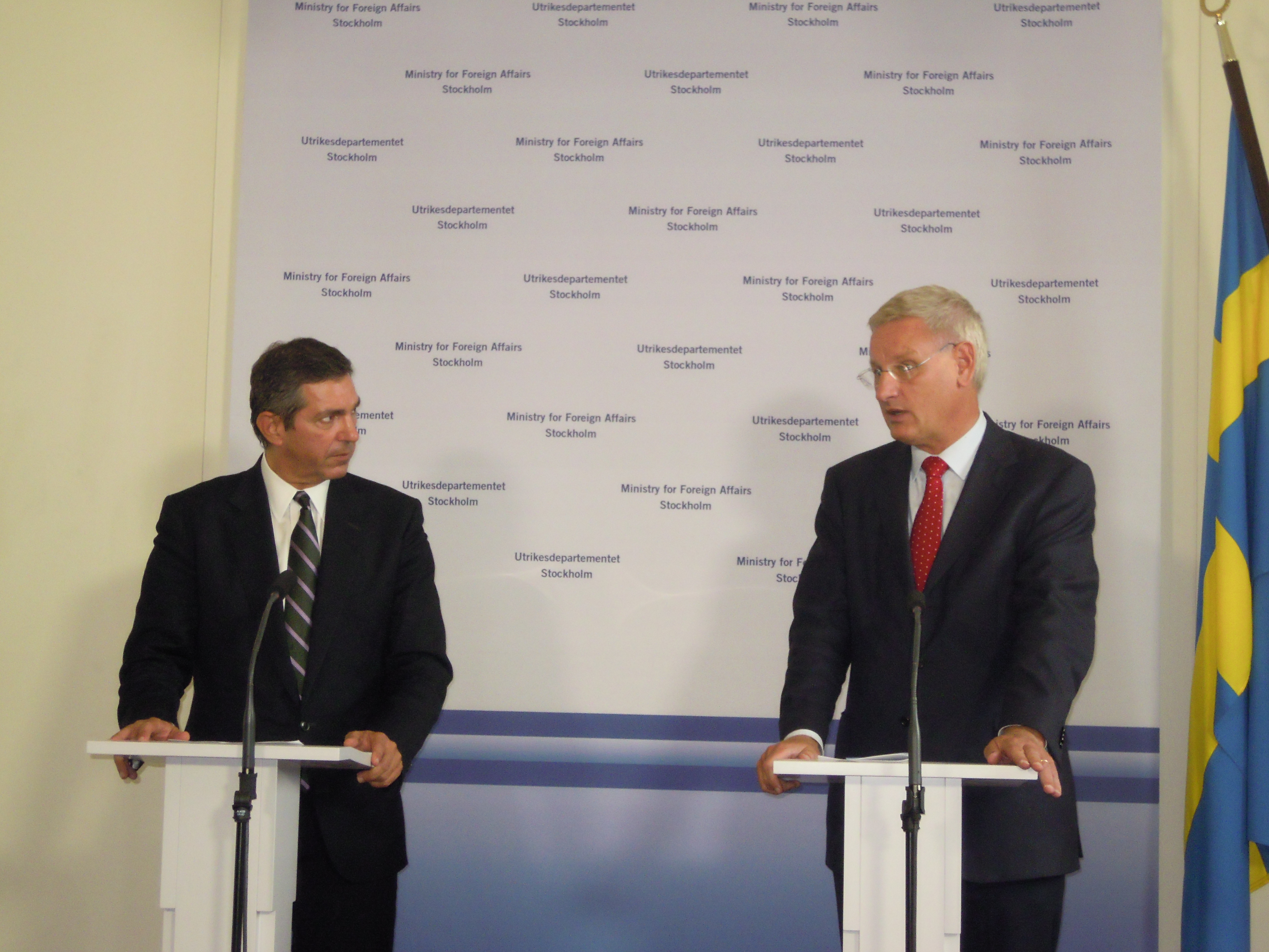 Στο πλαίσιο της επίσκεψής του στη Σουηδία, ο ΥΠΕΞ Στ. Λαμπρινίδης συναντήθηκε με τον Σουηδό ομόλογό του κ. Carl Bildt./ In the framework of his visit in Sweden, FM St. Lambrinidis met with his Swedish counterpart Mr. Carl Bildt. Πηγή/Source: ΓΤΕ Πρεσβείας της Ελλάδος στη Στοκχόλμη/Press Office of the Embassy of Greece in Stockholm